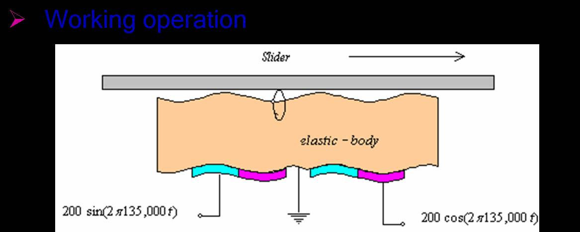 động cơ piezo